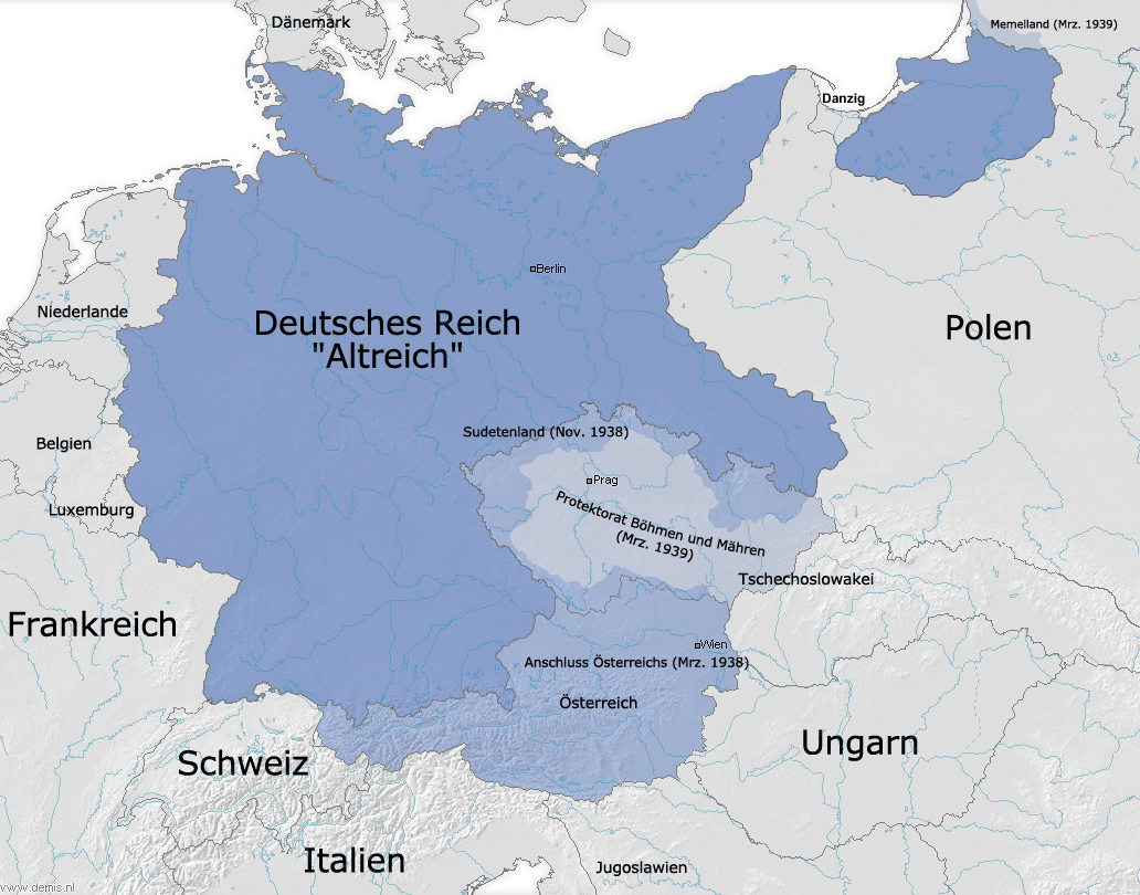 Die Grenzen des Deutschen Reiches (Altreich) am 31. 12. 1937 und Ausdehnungen 1938/1939